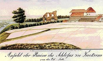 Tukumsi linnusevaremed ida poolt XIX sajandi algul markii Paulucci albumis. Tundmatu autor markii Paulucci jaoks.